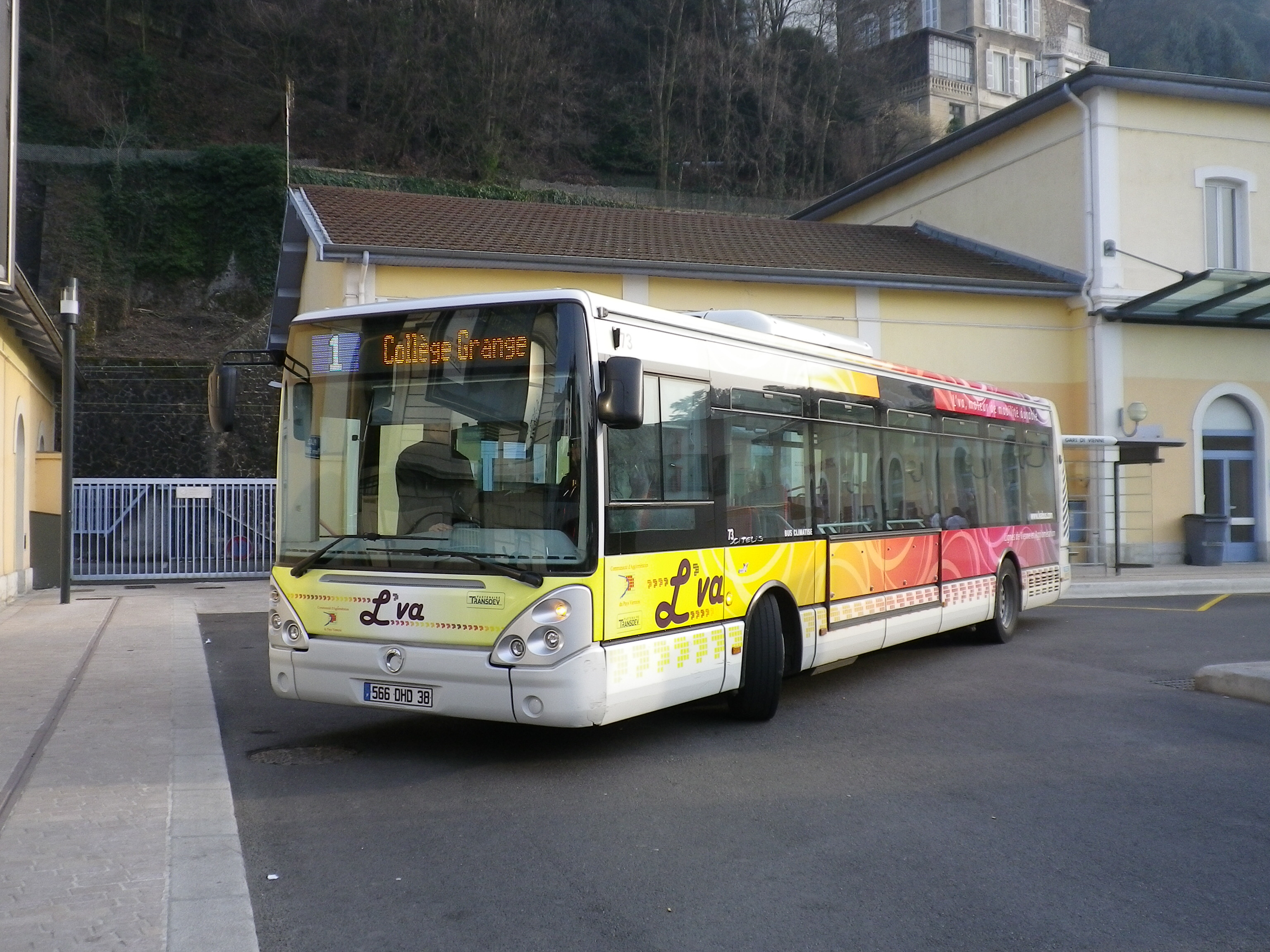 Irisbus Citélis 12 - Réseau L'VA - ViennePentax Optio H90